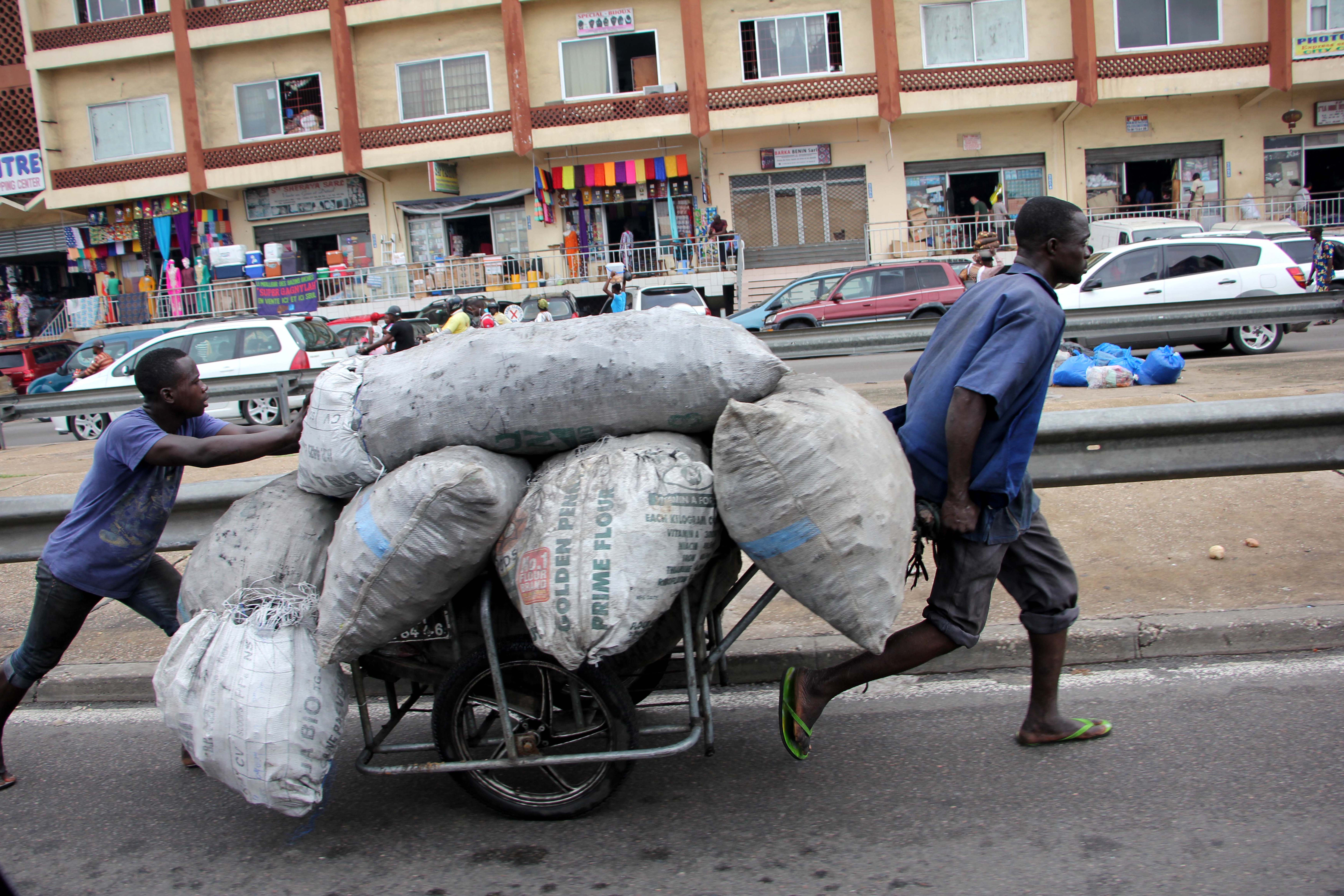 all day long this man can go back and forth to go home with a large sum of money but while being tired of course This is an image with the theme "Africa on the Move or Transport" from: Benin